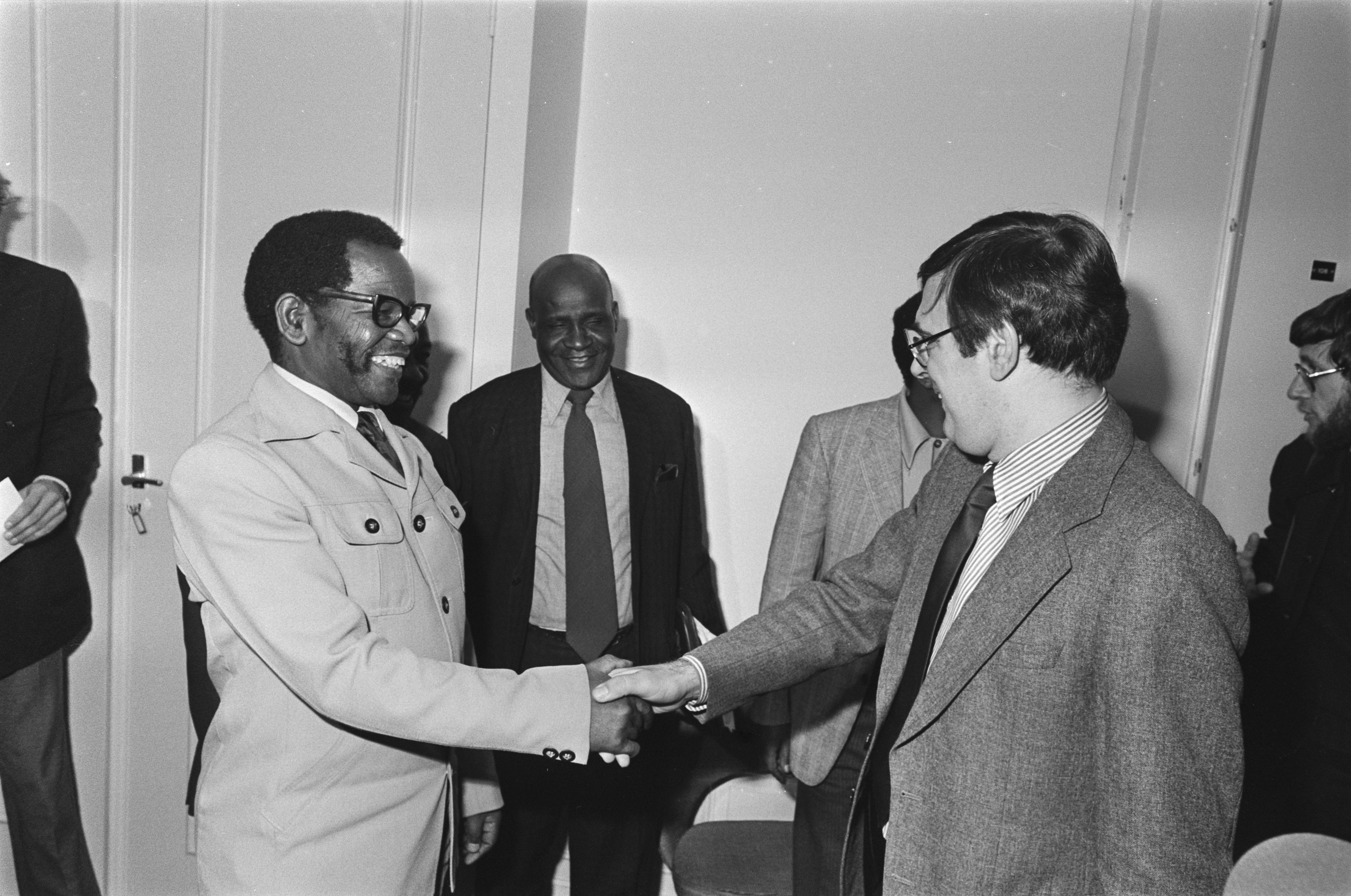 Collectie / Archief : Fotocollectie Anefo Reportage / Serie : [ onbekend ] Beschrijving : Minister Pronk ontvangt top ANC (Zuidafrikaanse bevrijdingsbeweging); v.l.n.r. president ANC Olivier Tambo secretaris Nkobi en minister Pronk / Datum : 5 oktober 1977 Trefwoorden : ontvangsten, presidenten Persoonsnaam : Anc, Pronk, Jan Fotograaf : Croes, Rob C. / Anefo Auteursrechthebbende : Nationaal Archief Materiaalsoort : Negatief (zwart/wit) Nummer archiefinventaris : bekijk toegang 2.24.01.05 Bestanddeelnummer : 929-3767